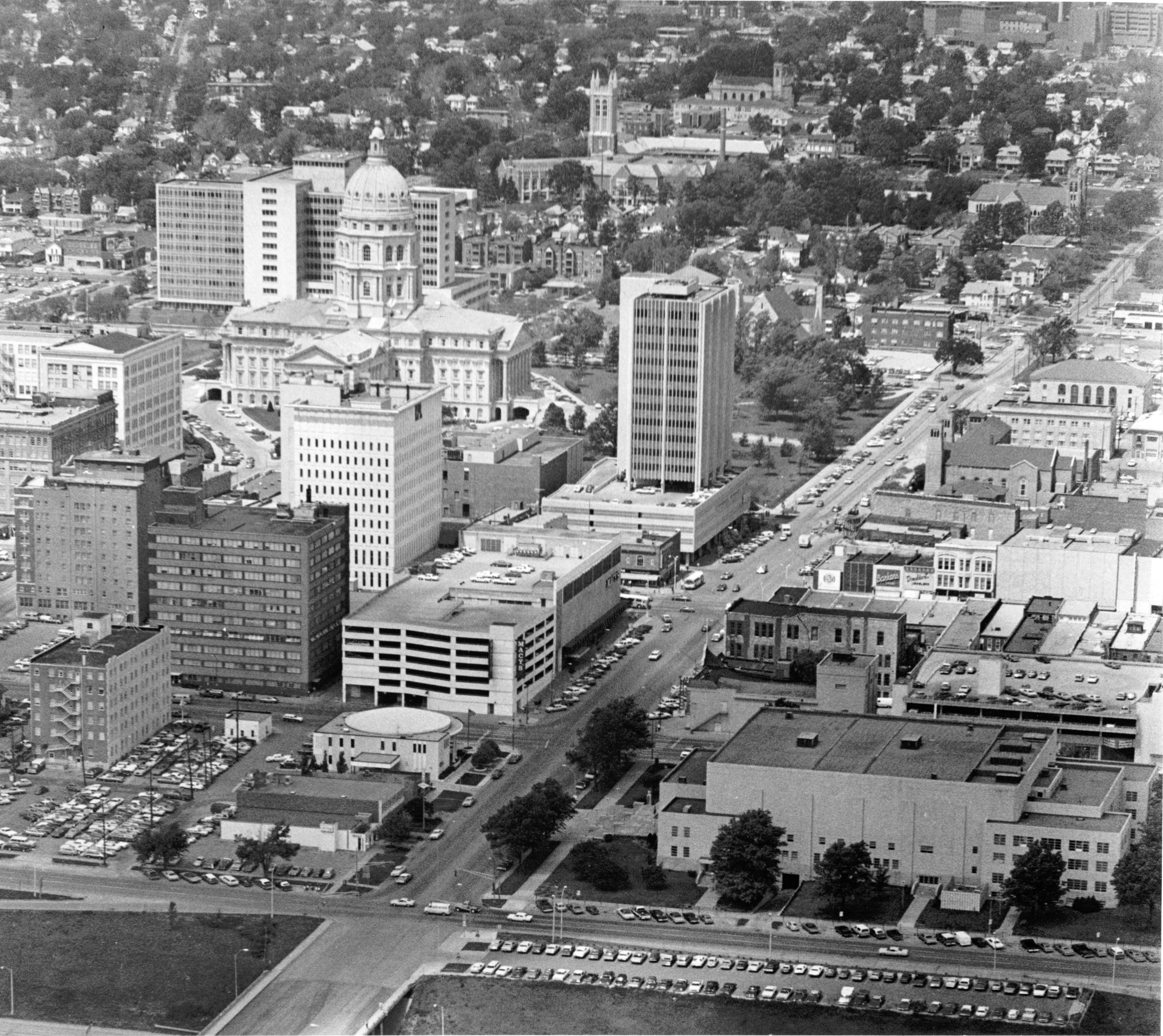 Topeka, Kansas 23 September 1980